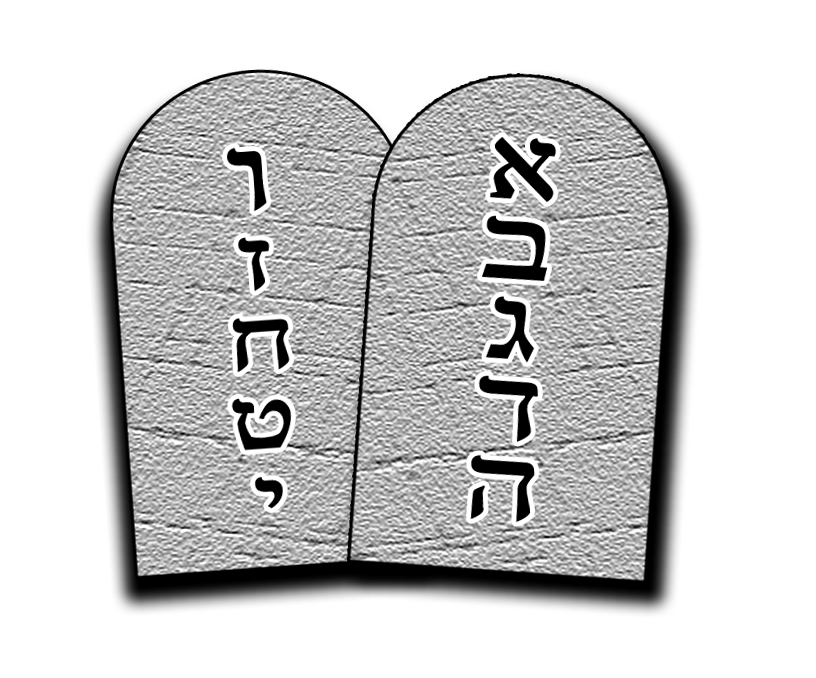 Скрижали Завета